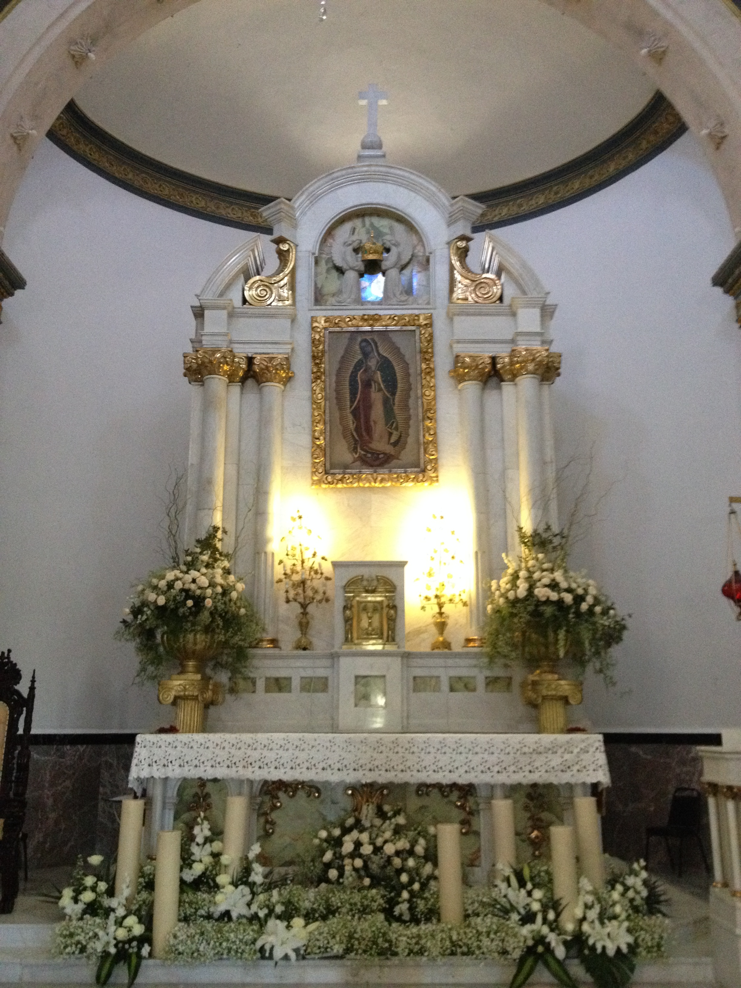 Altar mayor del Santuario de Guadalupe de Chihuahua, Chih.